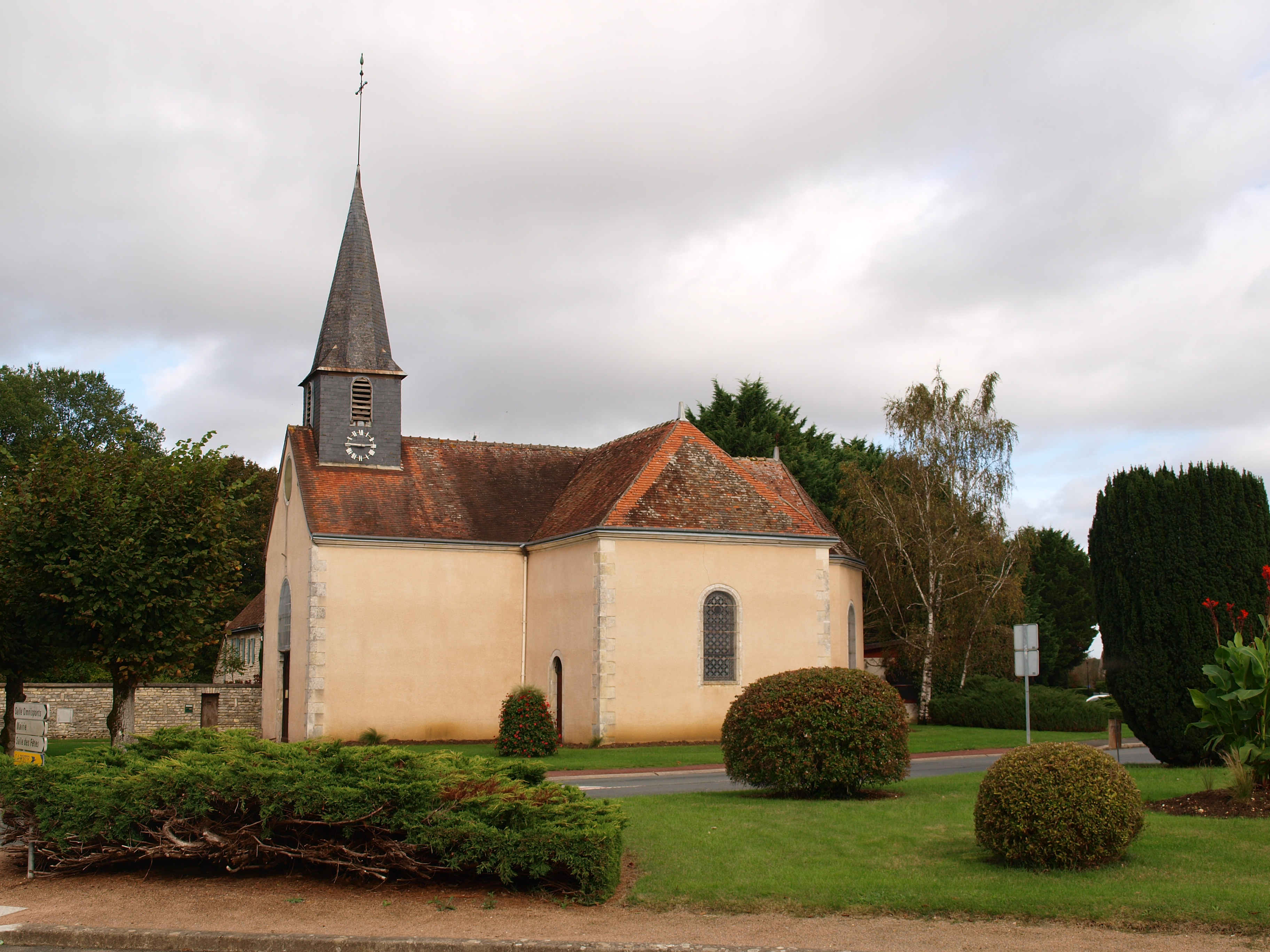 Étrechet (Indre, France) ; église